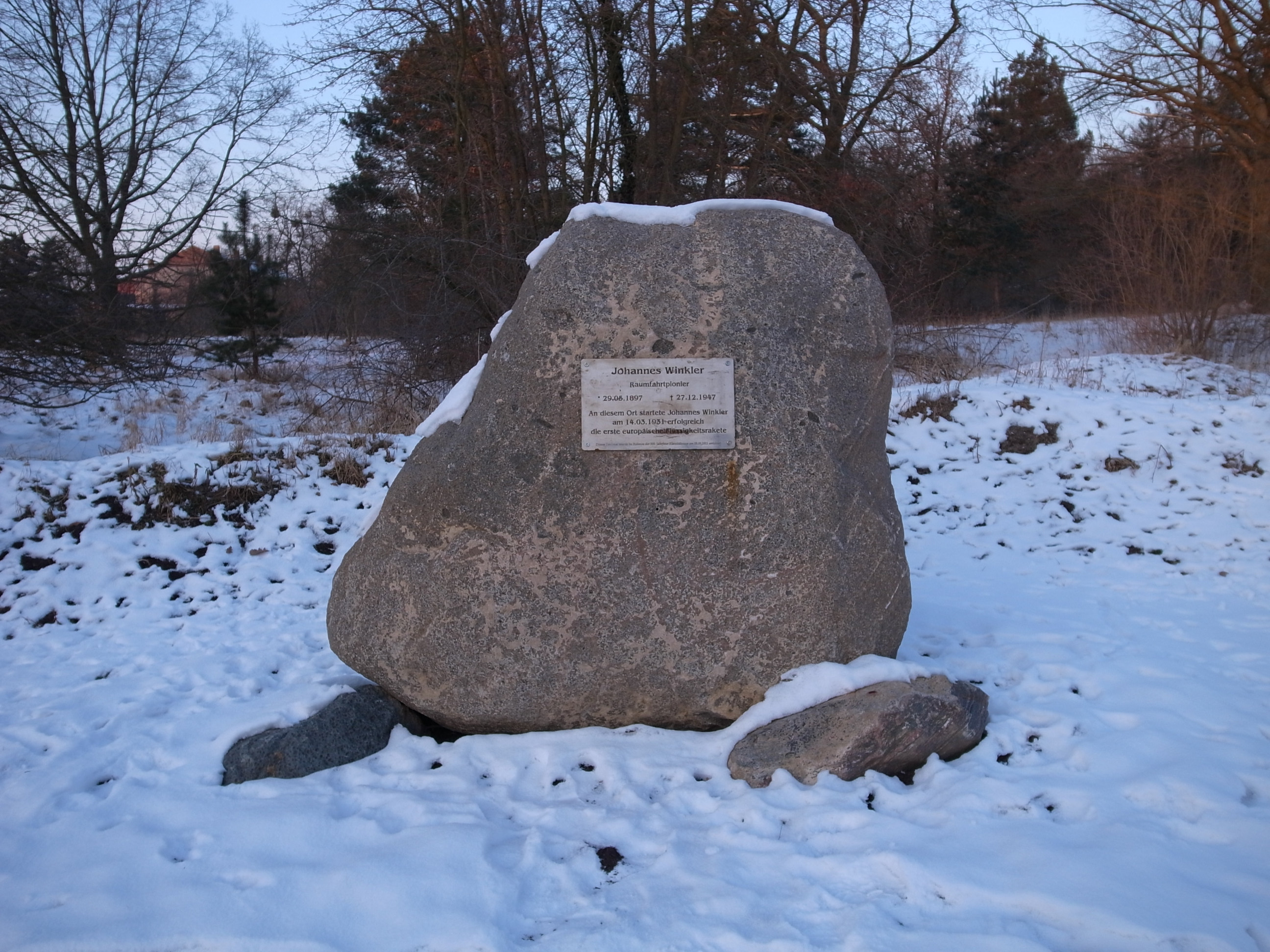 Johannes Winkler Gedenkstein in Dessau auf den ehemaligen Exerzierplatz zwischen Kleinkühnau und Großkühnau